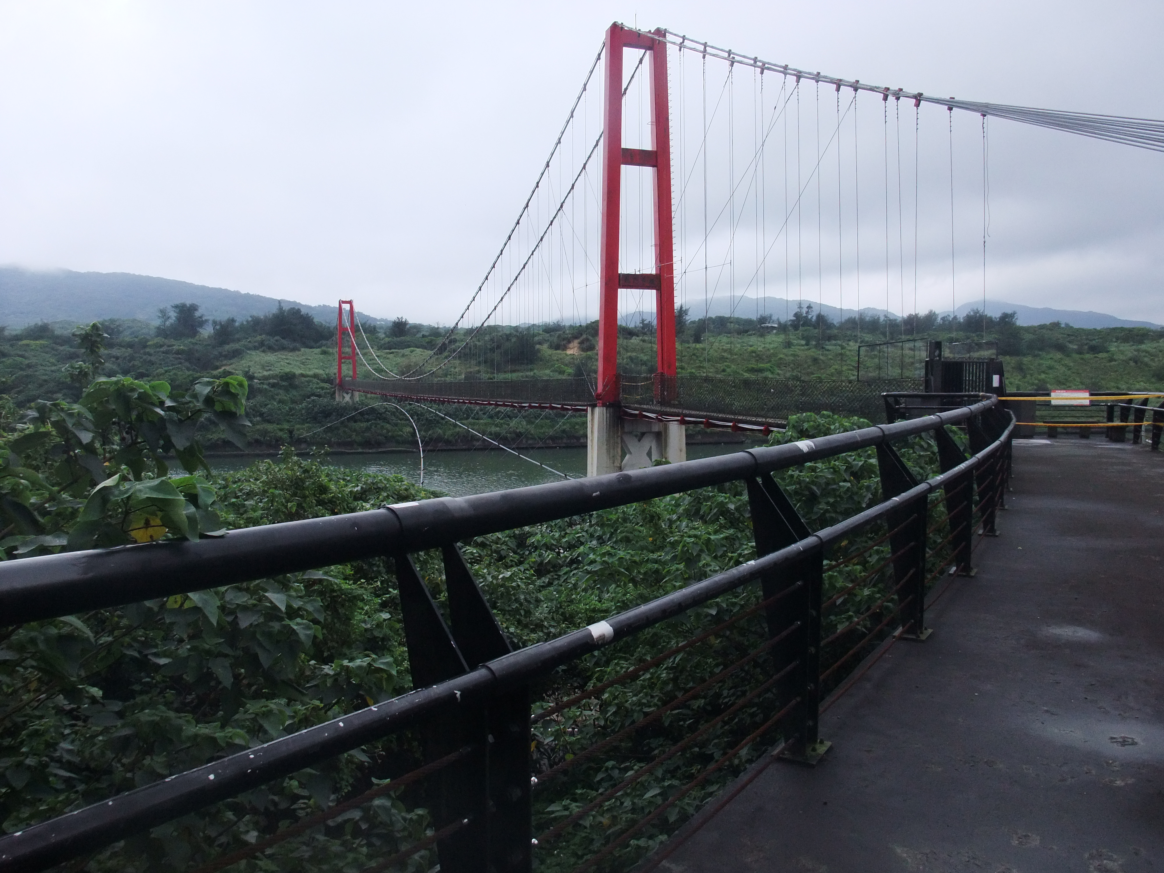 中文（台灣）: 龍門自行車道的龍門吊橋